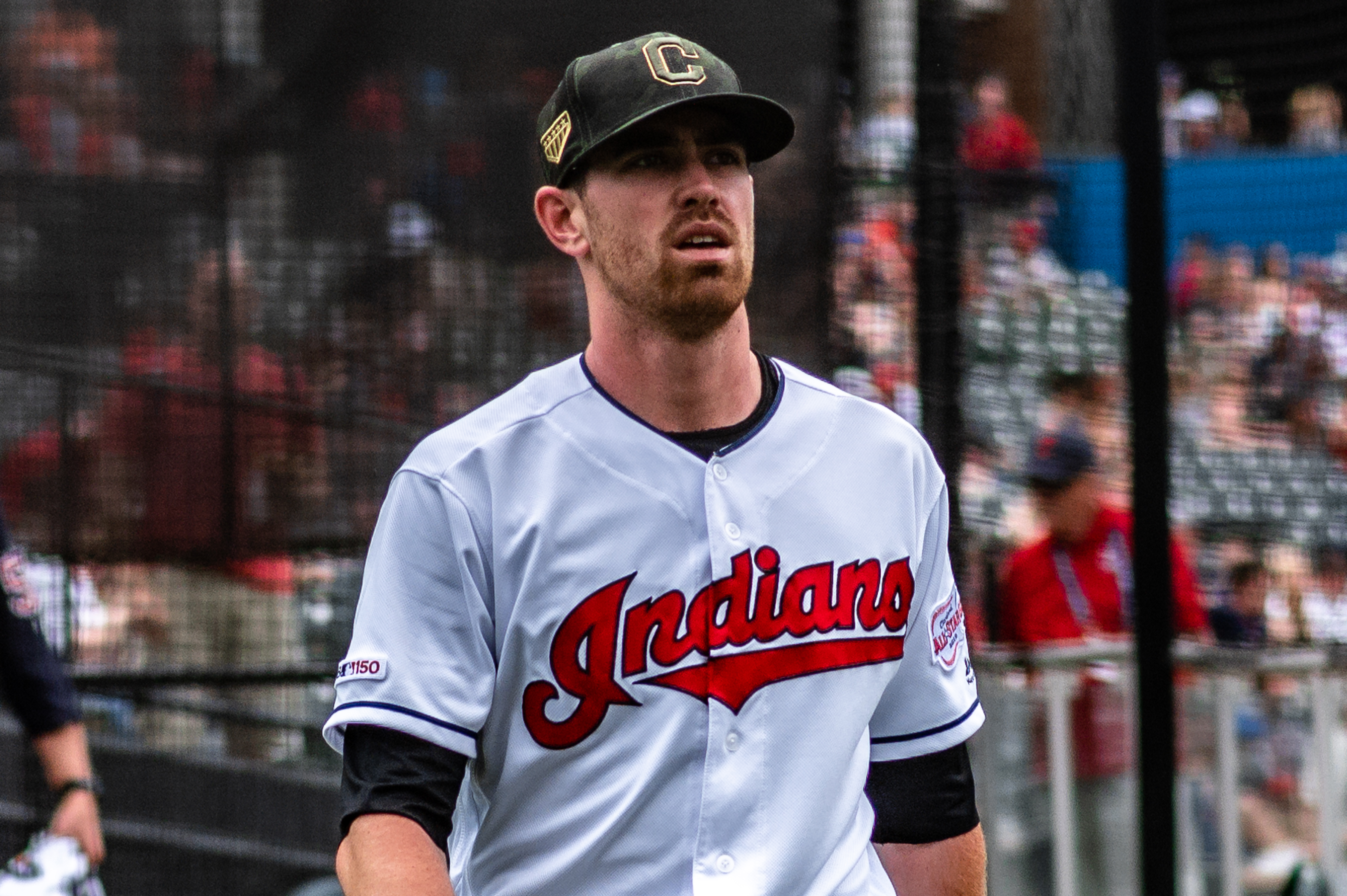 Shane Bieber